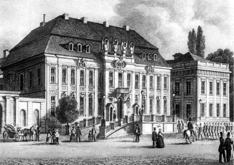 Das Kronprinzenpalais in Berlin Unter den Linden vor dem Umbau 1856.